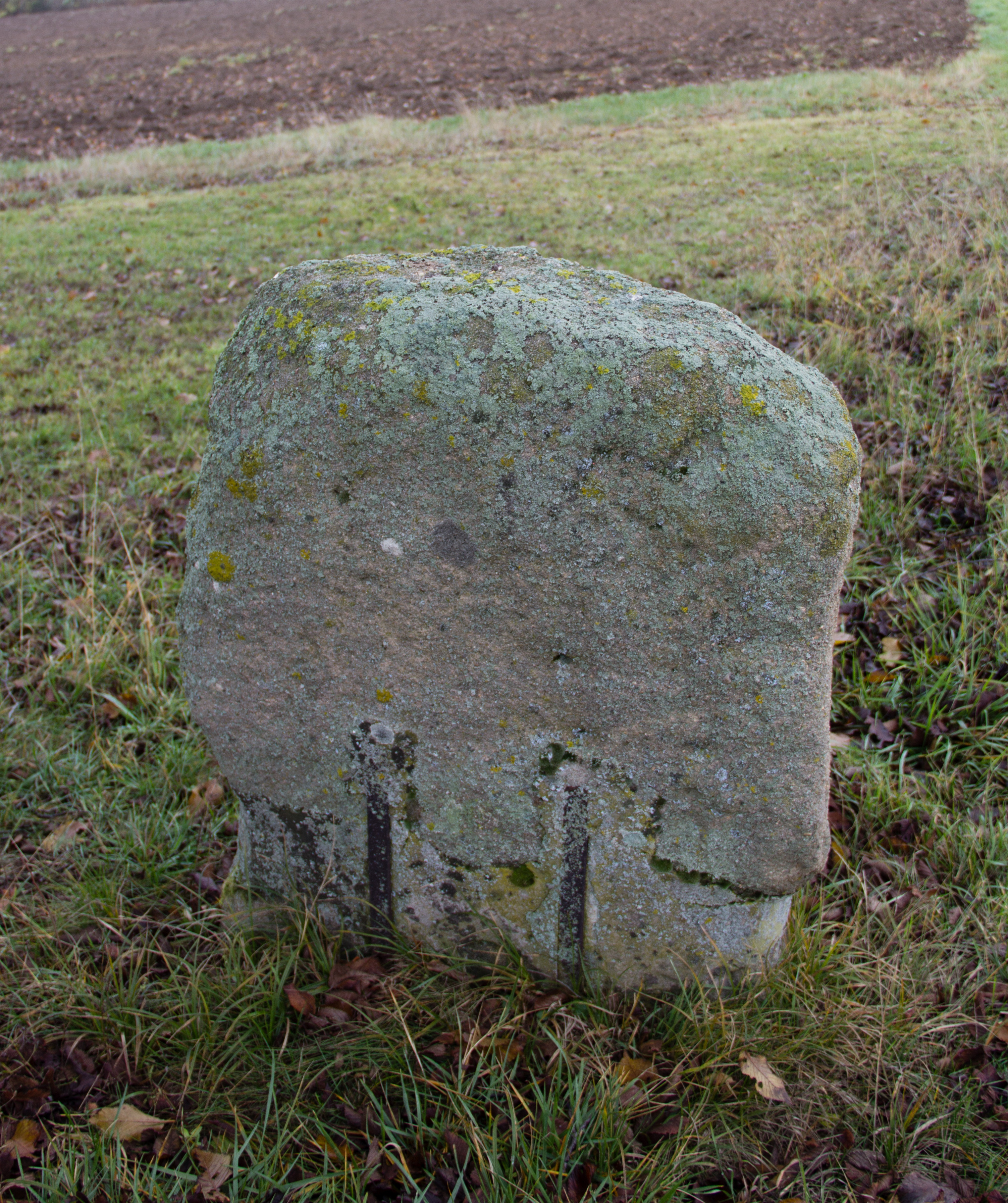 Steinkreuz,Sandstein, bei Jahrsdorf